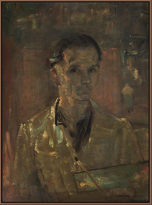 Idősebb Benedek Jenő (Kecskemét, 1906. január 16. – Budapest, 1987. július 19.) magyar festő Önarckép című olajfestménye, 1936 - 76x56 cm